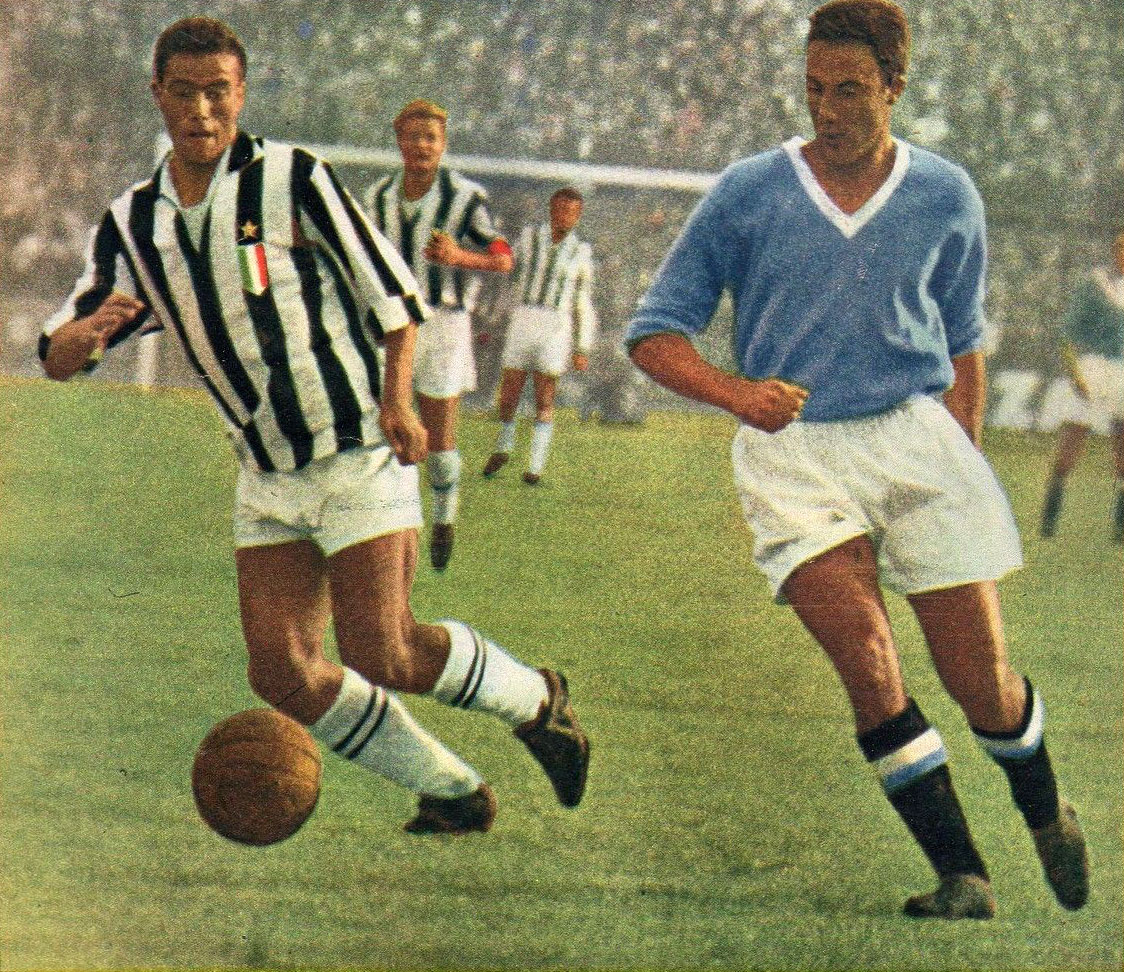 Torino, stadio Comunale, 12 ottobre 1958. L'attaccante bianconero Bruno Nicolè (a sinistra) e il difensore azzurro Guglielmo Costantini (a destra) in azione nel corso della sfida tra Juventus e Napoli (2-0) valevole per la 4ª giornata del campionato italiano di Serie A 1958-59; sullo sfondo si riconosce il capitano dei bianconeri, Giampiero Boniperti.